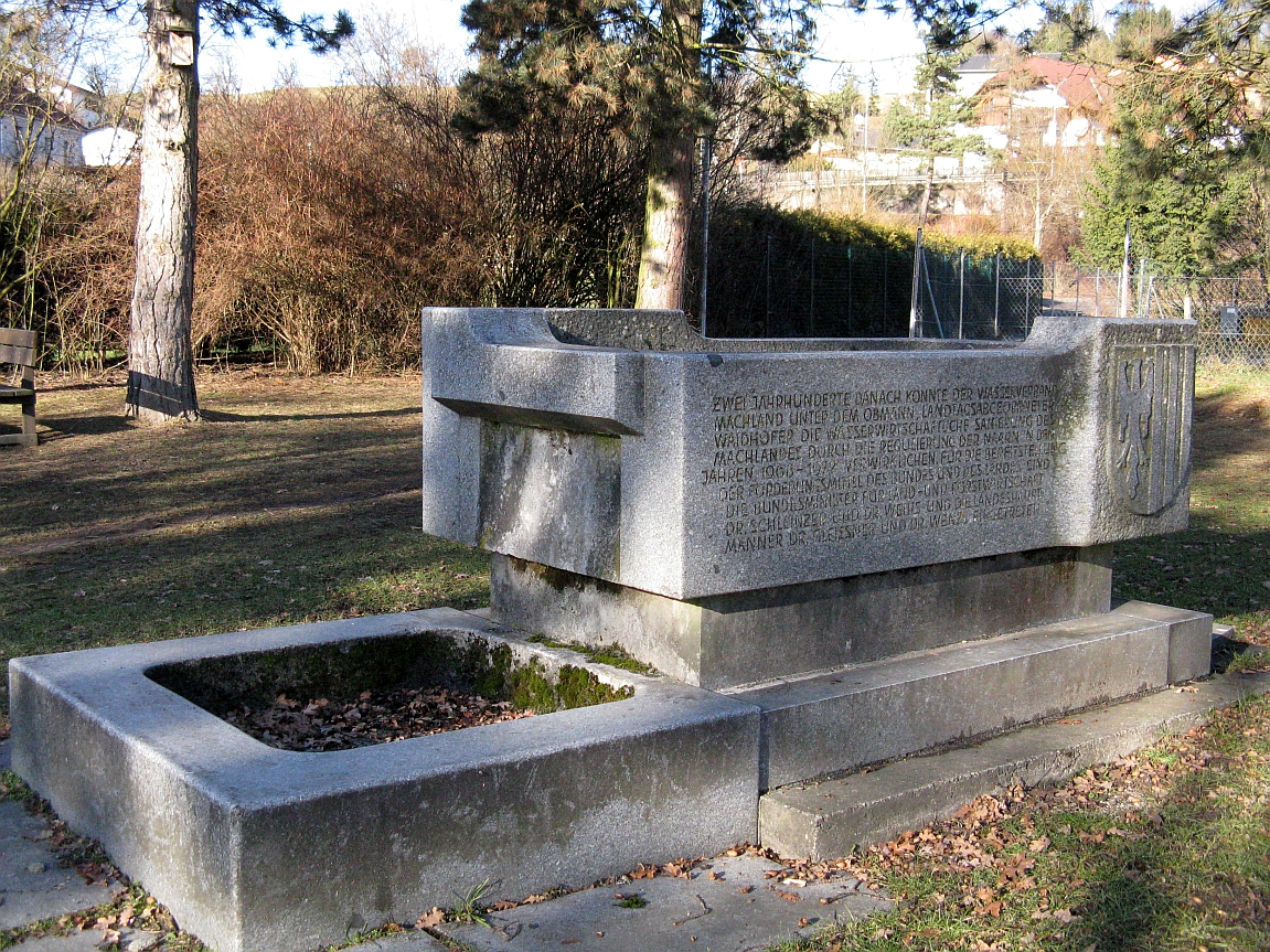 Der von Radler-Wöß 1972 geschaffene Granitbrunnen steht in Perg, Oberösterreich, Österreich, im Seyrpark und erinnert an die Naarnregulierungen im 18. und 20. Jahrhundert.